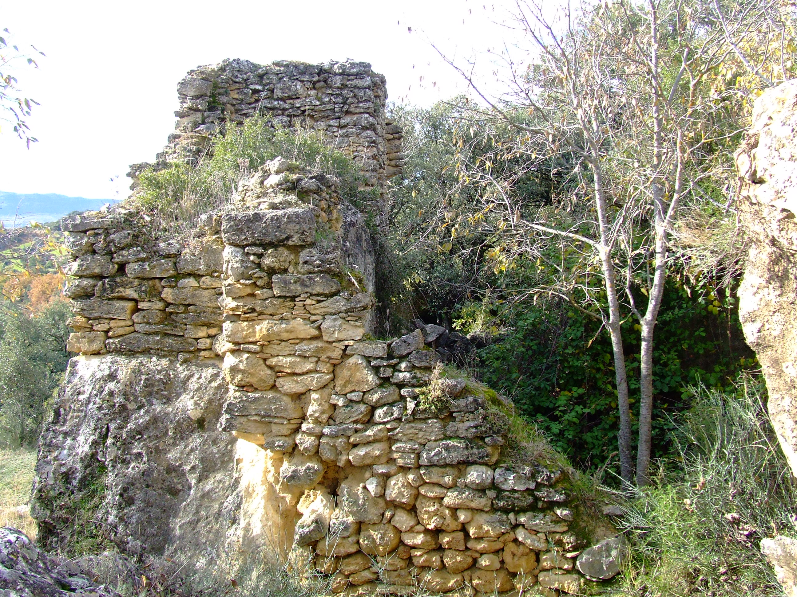 Restes del primitiu santuari de la Mare de Déu de les Esplugues (Conques, Isona i Conca Dellà, Pallars Jussà)